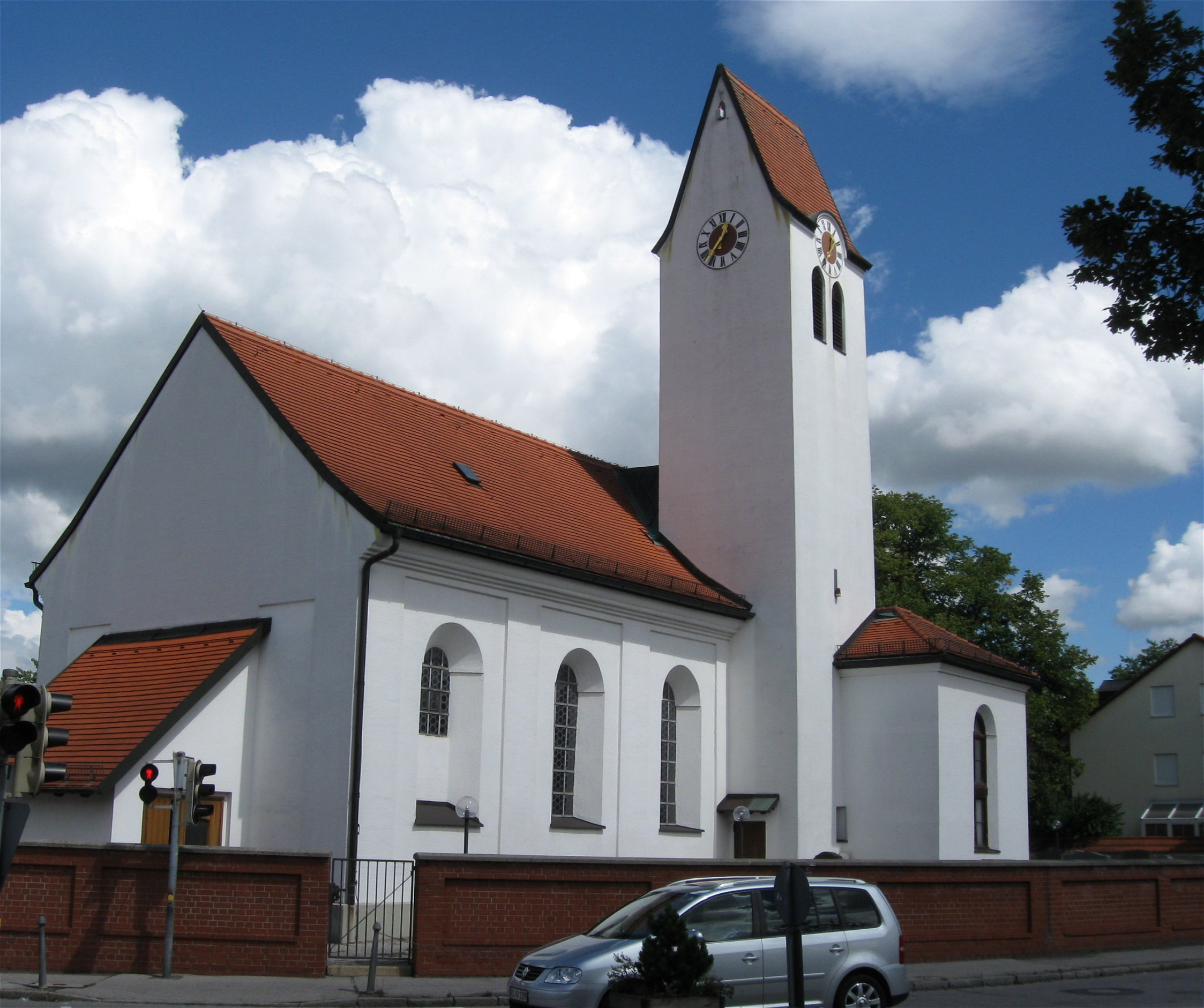 Glonner Straße, Putzbrunn; Katholische ehemalige Pfarrkirche St. Stephan, barocker Saalbau mit eingezogenem Polygonalchor, Lisenengliederung sowie Chorflankenturm und angefügter Sakristei, erbaut in den Jahren 1723/1725. D-1-84-140-1